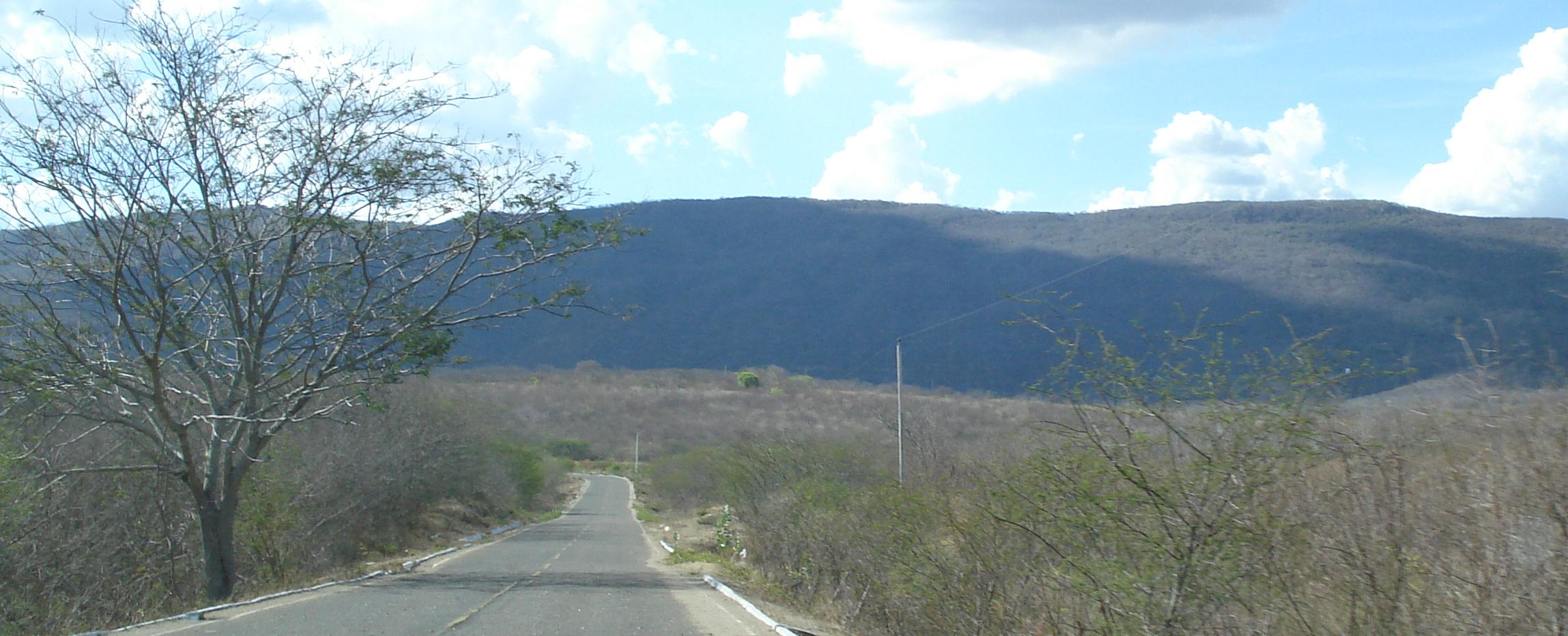 Serra do Estêvão, Quixadá, Ceará, Brasil.